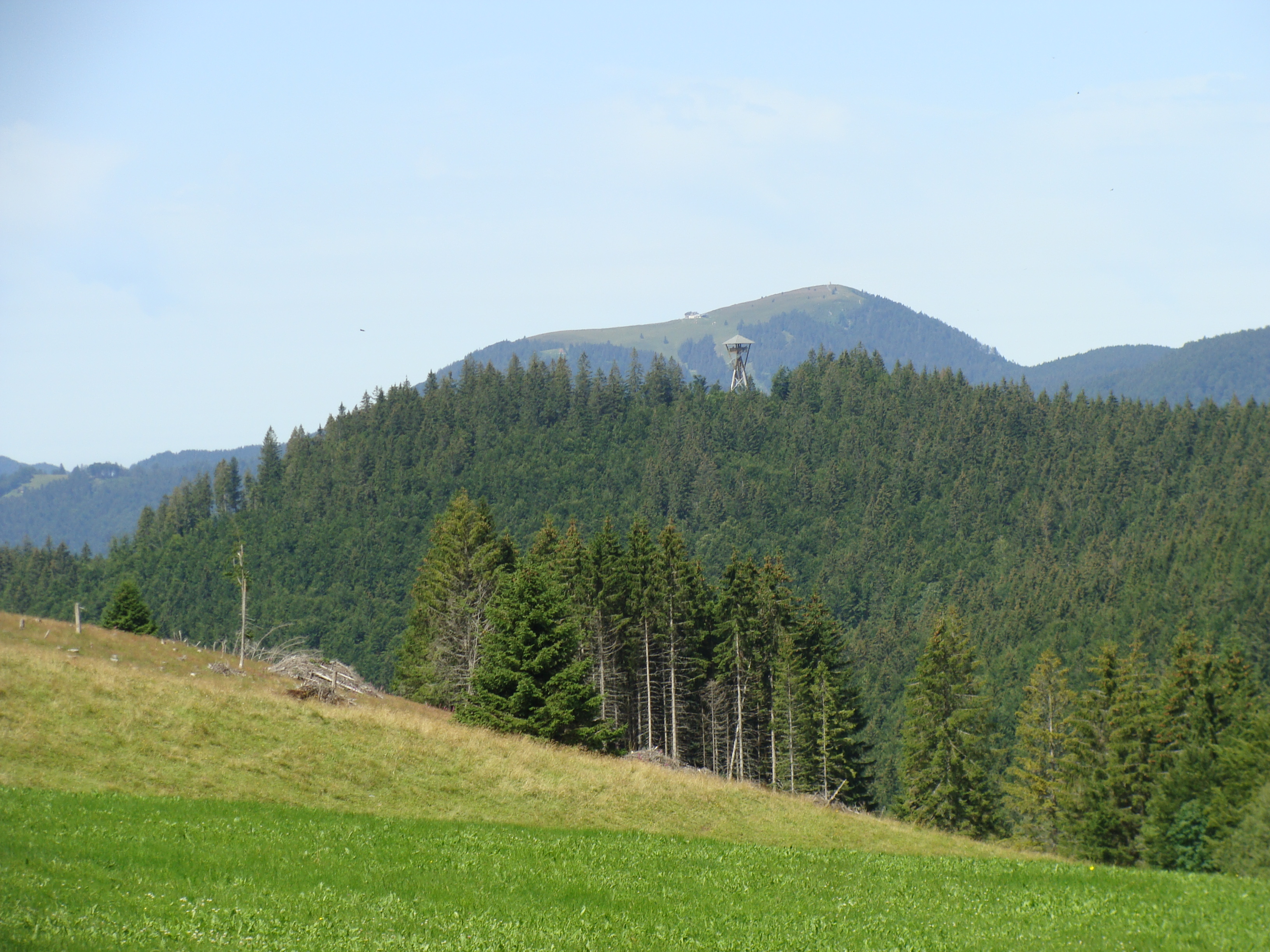 Hasenhorn mit Turm im Schwarzwald (im Hintergrund Belchen)